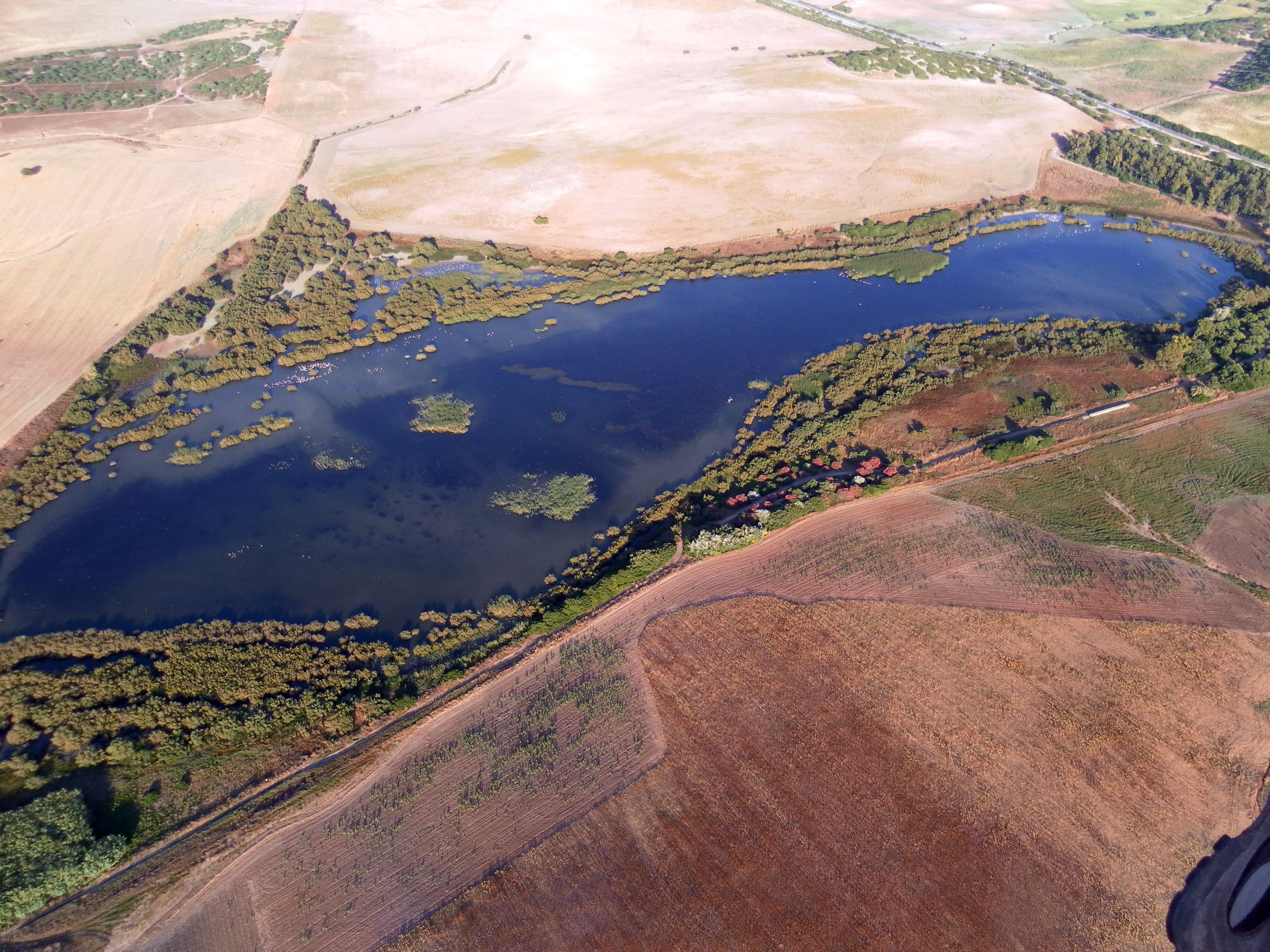 Aerea Laguna del Comisario